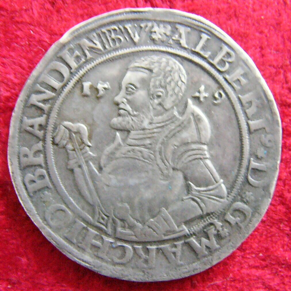 Münze mit dem Markgrafen Albrecht Alcibiades